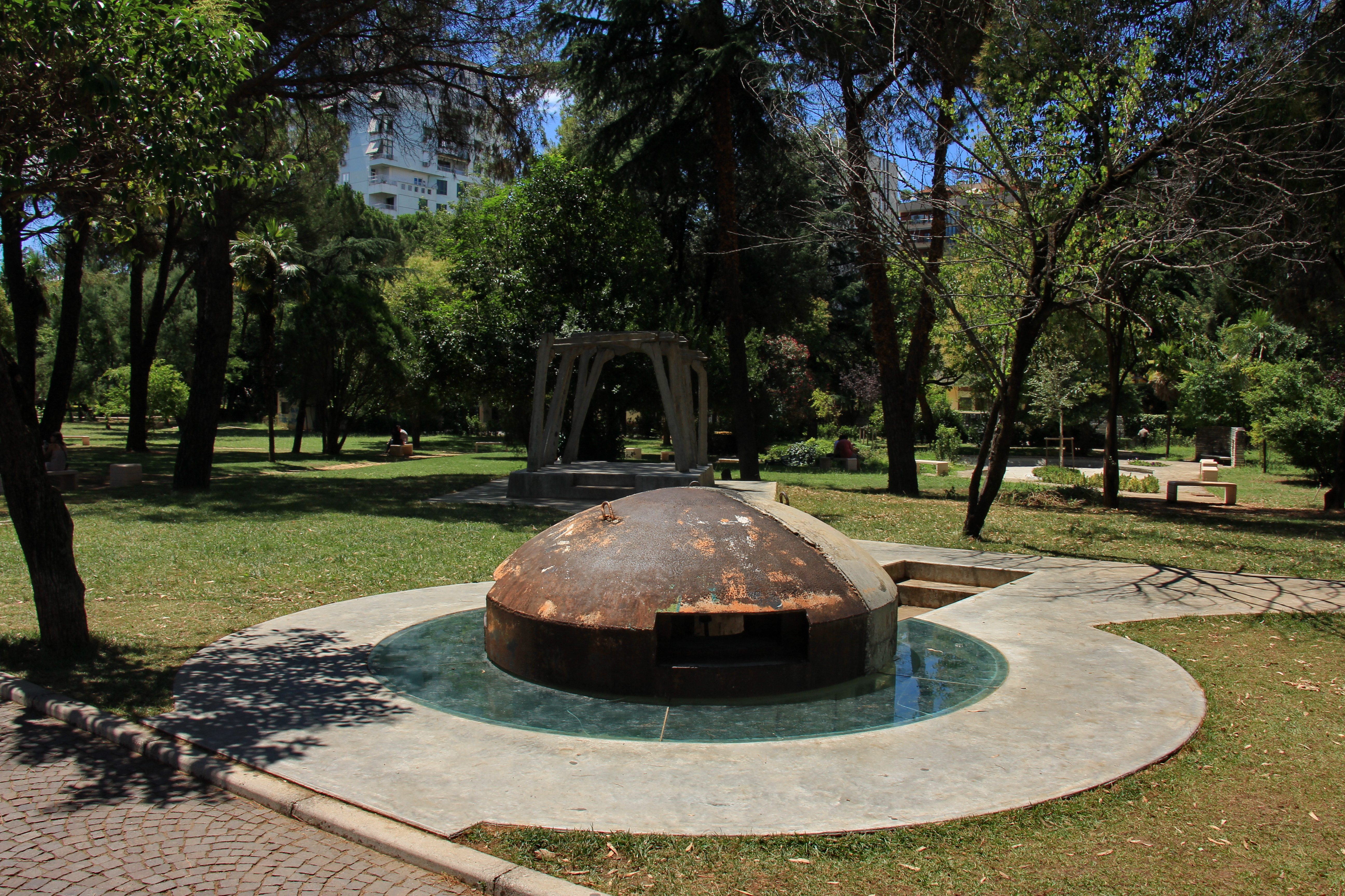 Postblloku (Tiranë)